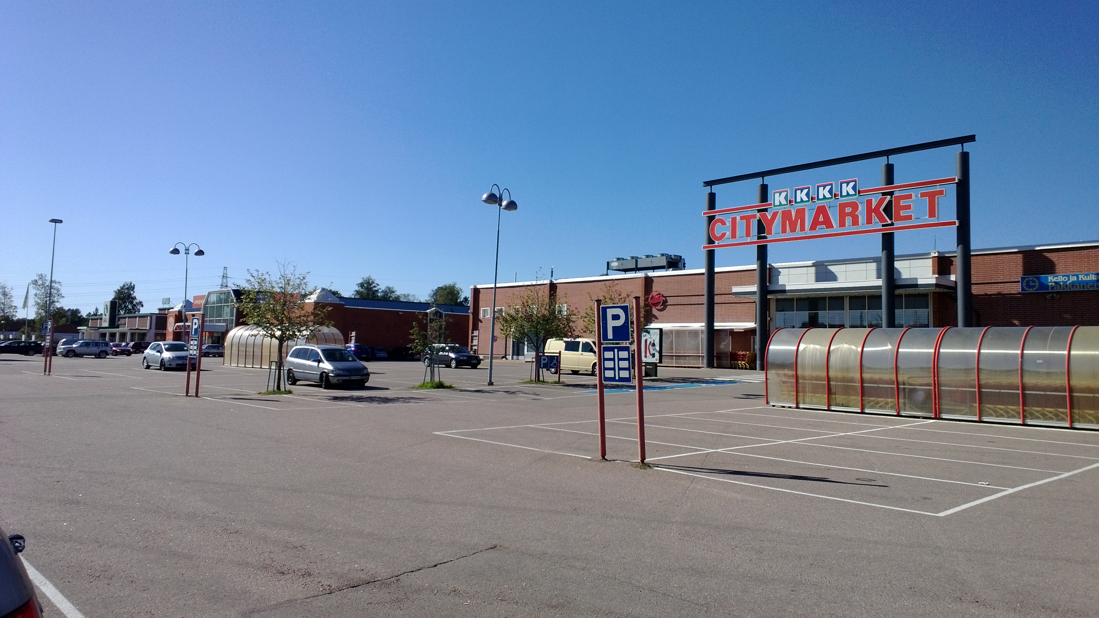 K-Citymarket Kotka